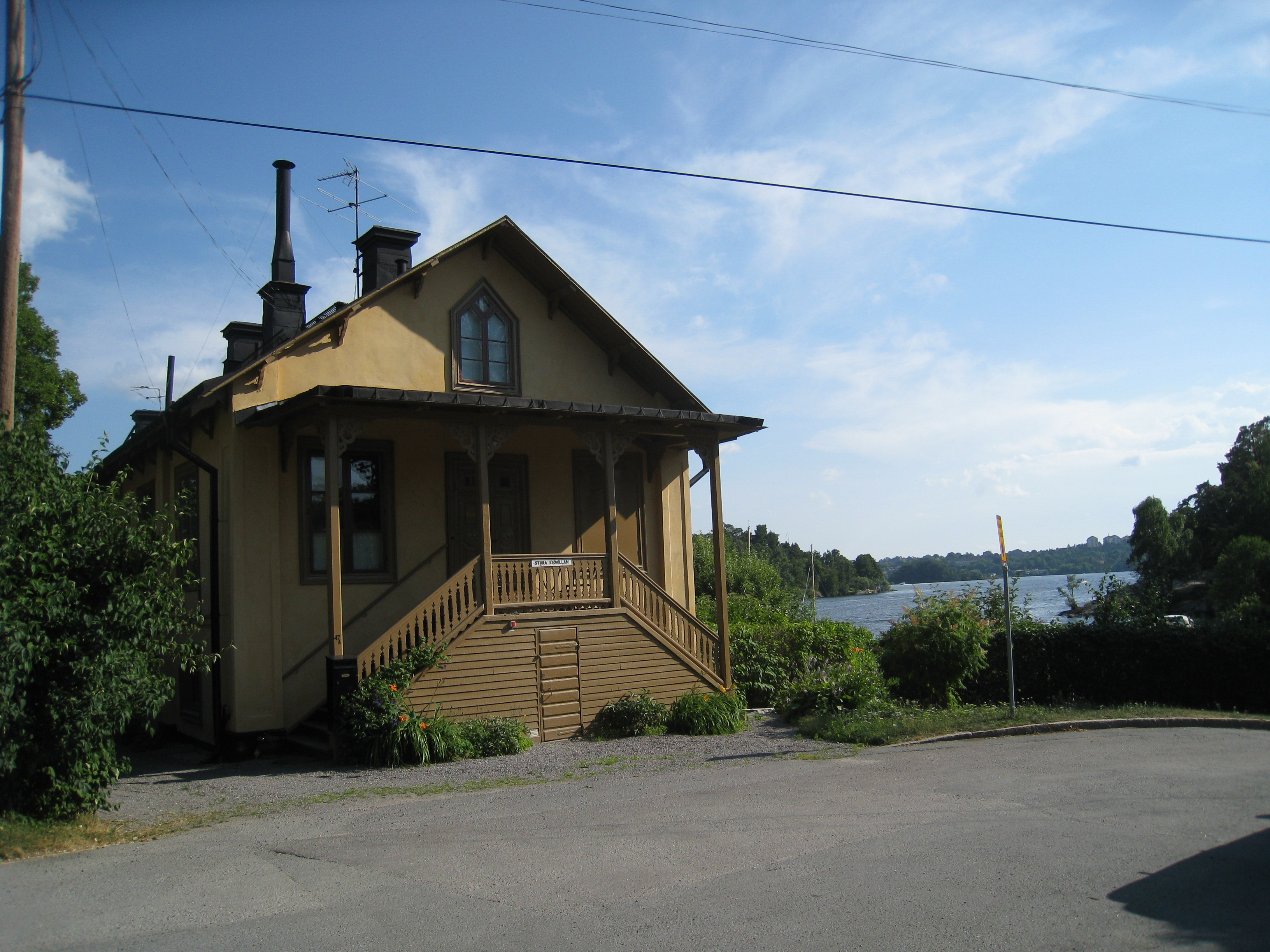 Stora sjövillan i Äppelviken i Bromma tillhör "Mälarstrandens sommarbebyggelse". Vy av gavelfasaden från nordväst och Mälaren i bakgrunden.